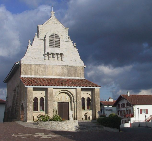 Description : Église du XVIIe Siècle. Lieu : Mouguerre - Pyrénées-Atlantiques (64) Date : Août 2005 Auteur : Khardan Licence : CC-BY-SA FR 2.0